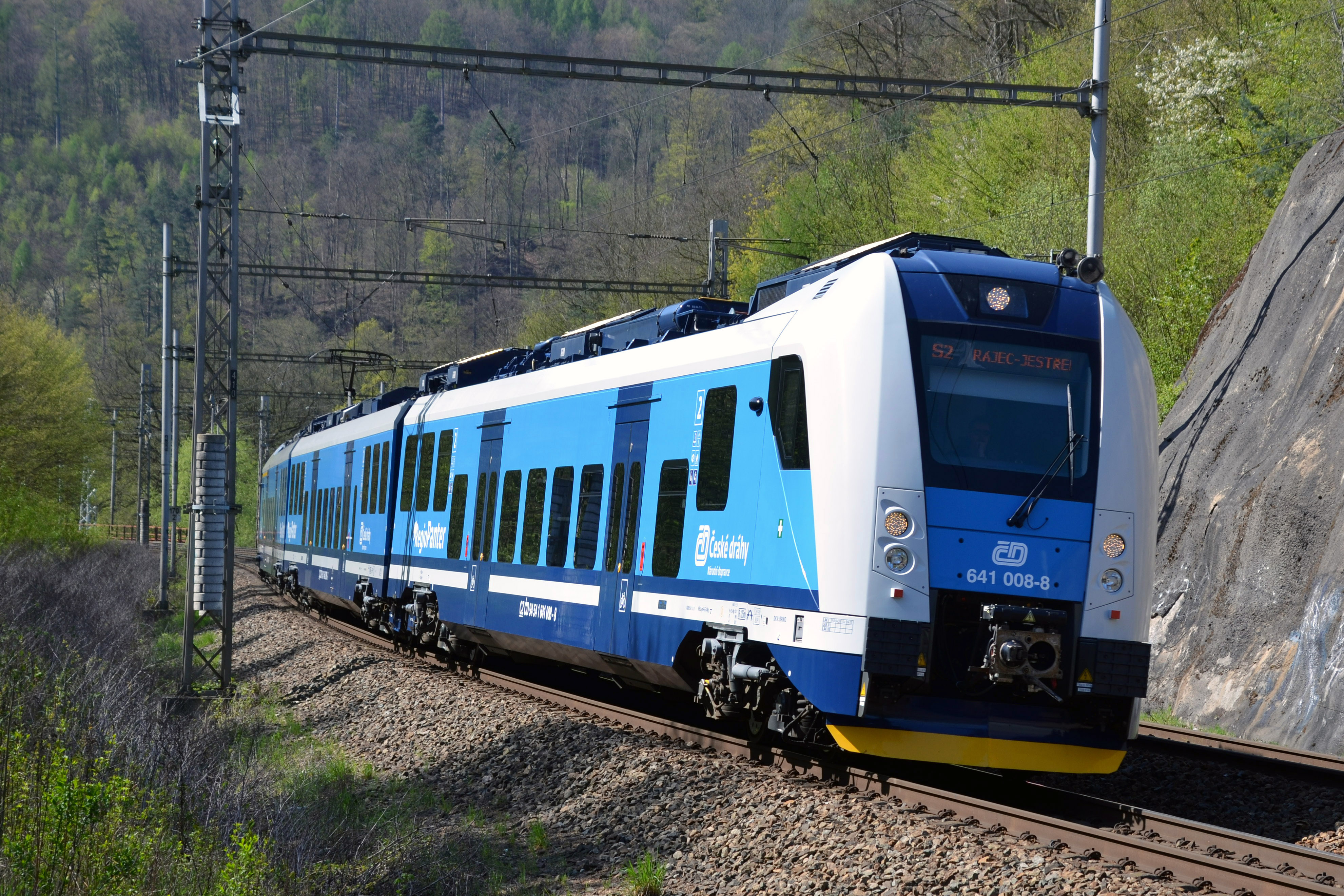 RegioPanter (Škoda 7Ev) při příjezdu do Adamova (od Brna)